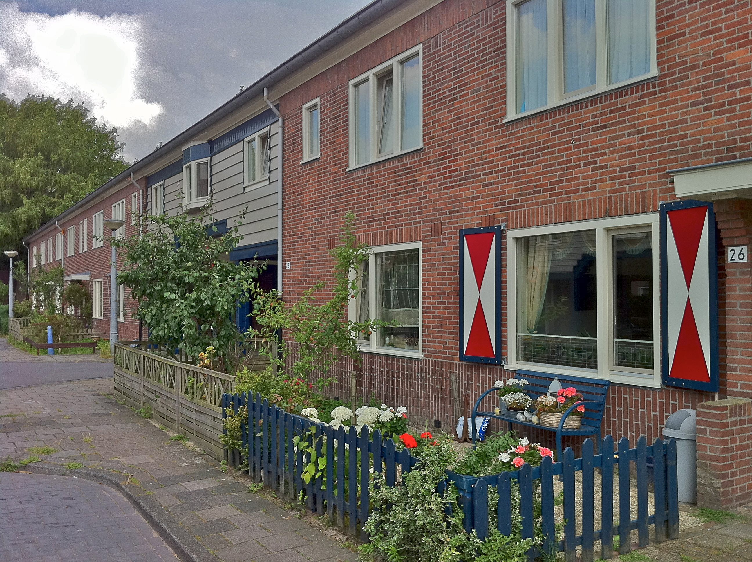 Tuindorp Oostzaan Amsterdam-Noord juli 2011